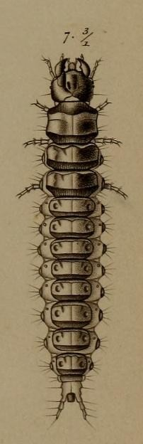 Amara convexiuscula Marsh., Larva adlta. Larva, prona.